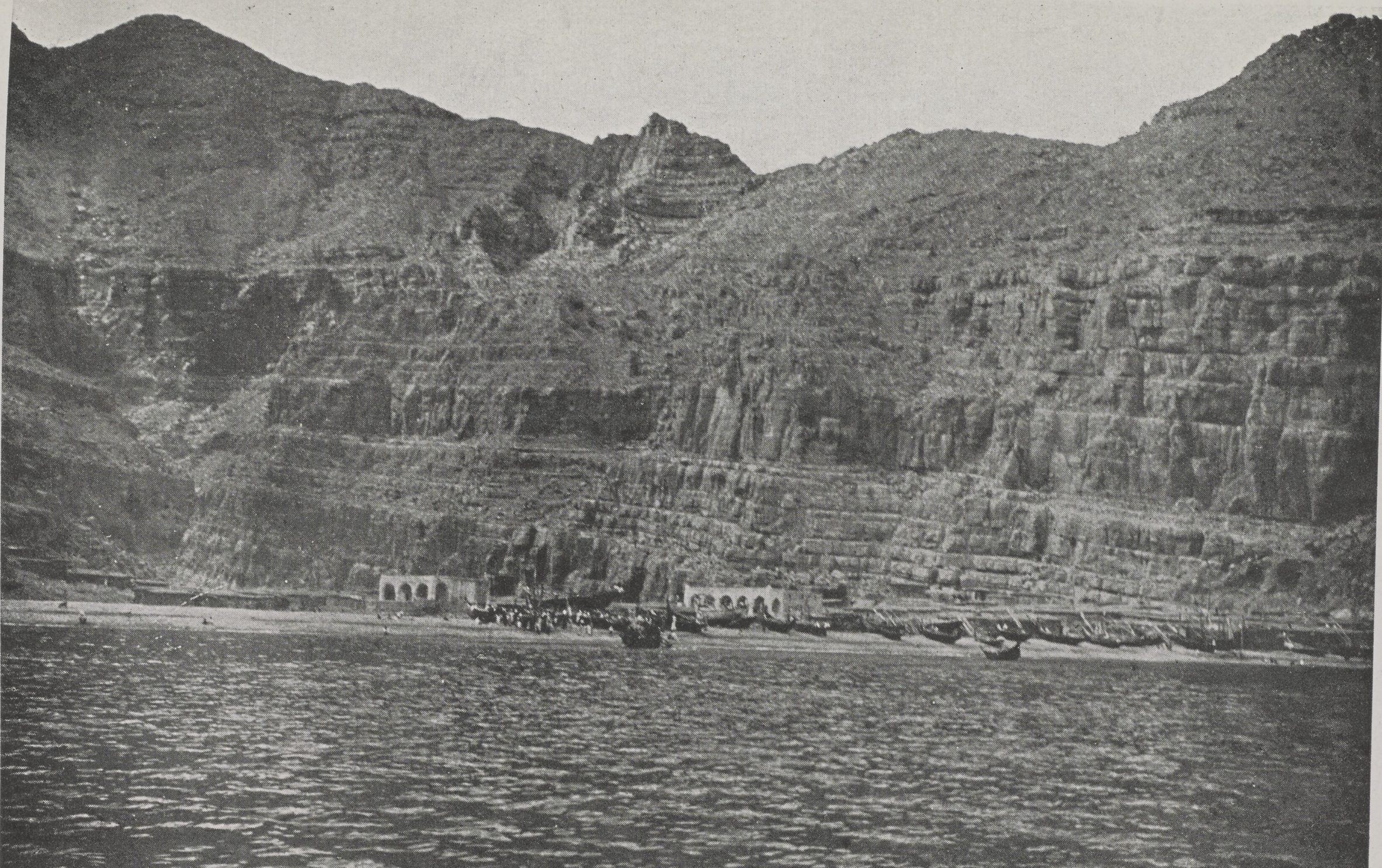 Kumzar, village on the coast of Musandam peninsula, northern Oman